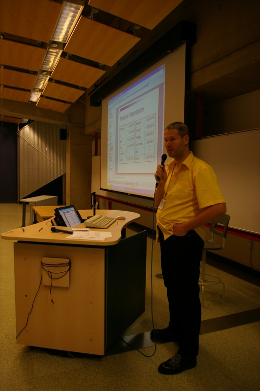 Martin Schäffer diskutas la Amerikan Oficejon